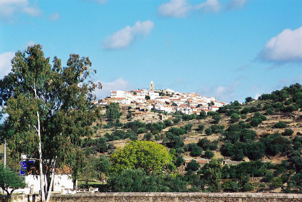 Segura (Portugal)